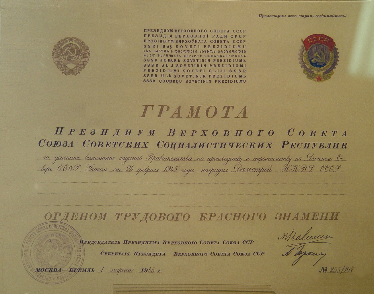 Грамота Верховного Совета СССР о награждении Дальстроя орденом Трудового Красного Знамени (Указ ПВС СССР от 24.02.1945). Фонд Магаданского областного краеведческого музея.